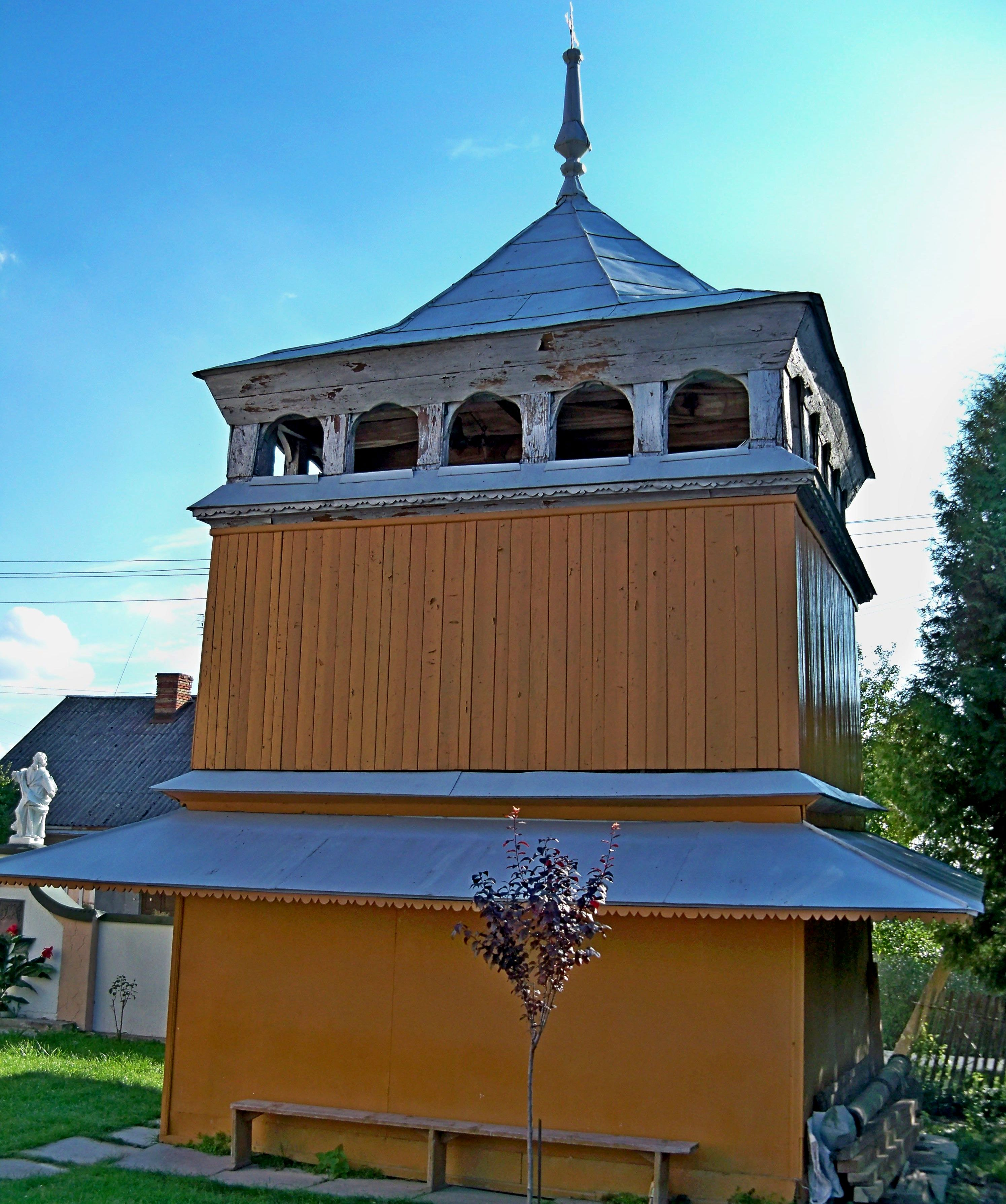 Дзвіниця церкви Св. Дмитрія (дер.), с. Оброшино